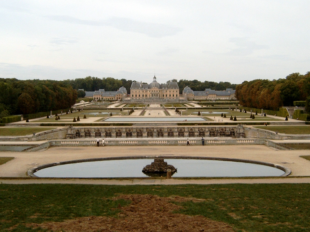 Die Anlage von Vaux-le-Vicomte aus Sicht der Herkulesstatue / Vaux-le-Vicomte as seen from the Hercules statue